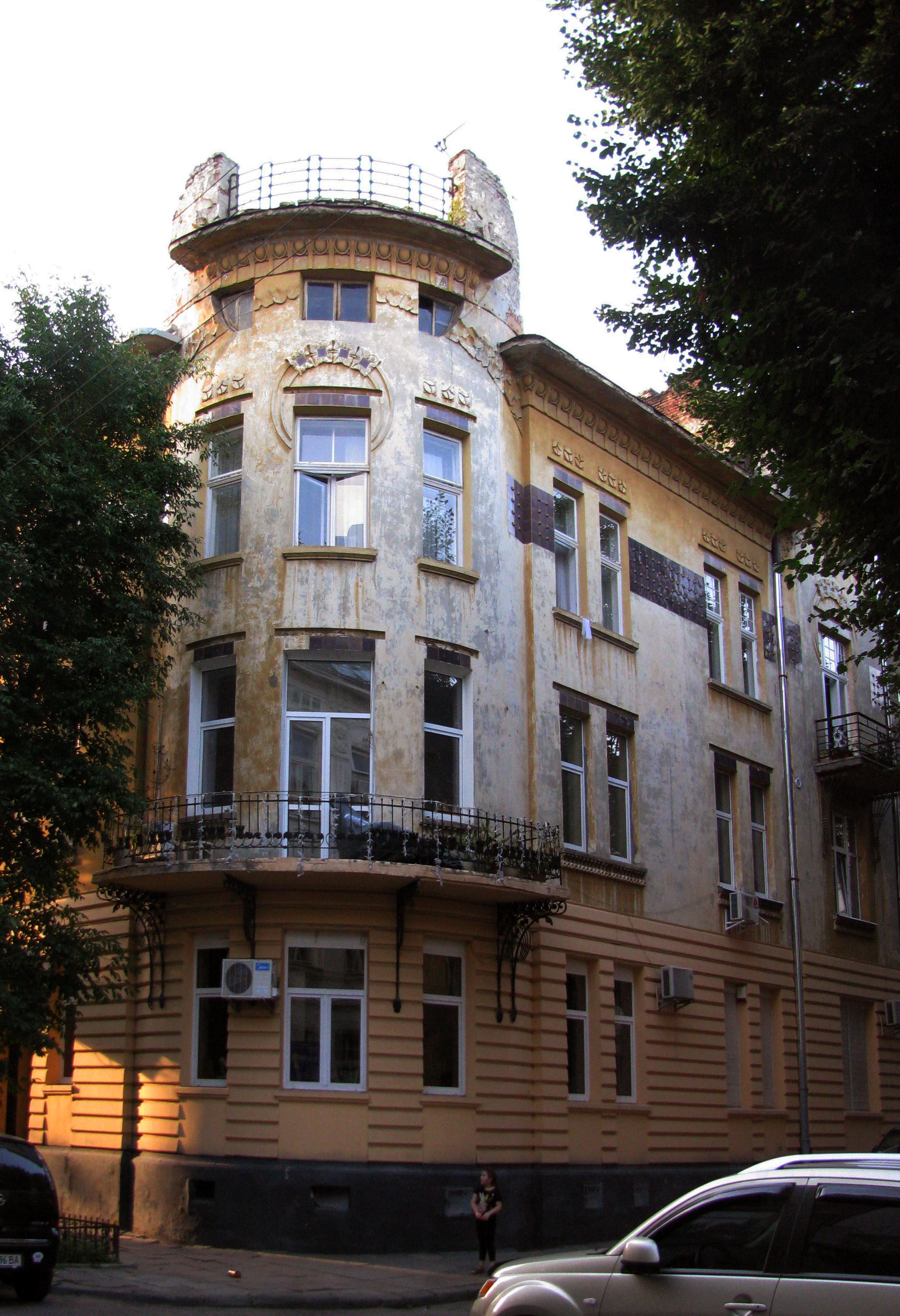 Будинок по вулиці Богомольця, 3 (Львів). Запроектований архітектурно-будівничим бюро Івана Левинського.